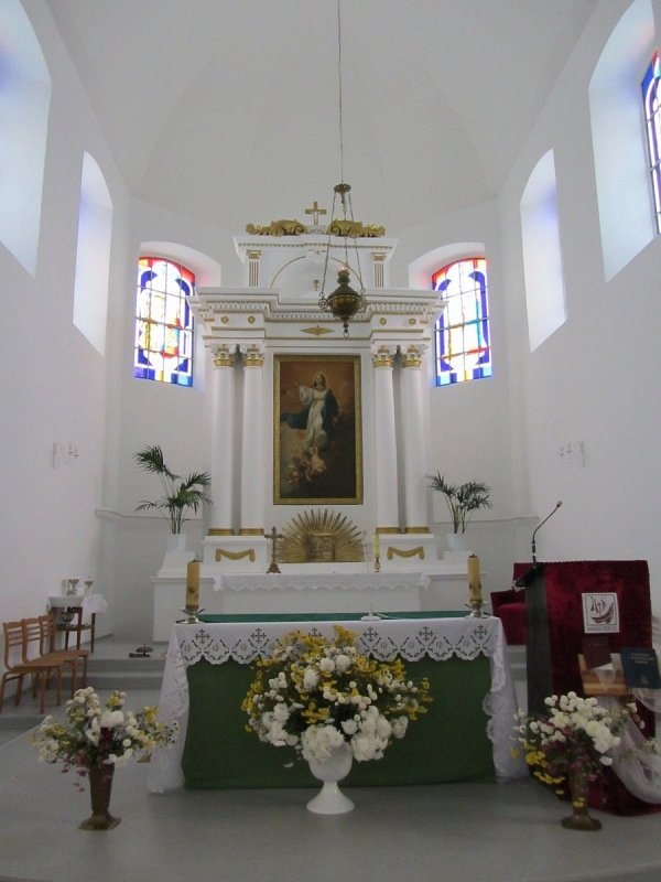 Дарава. Касцёл